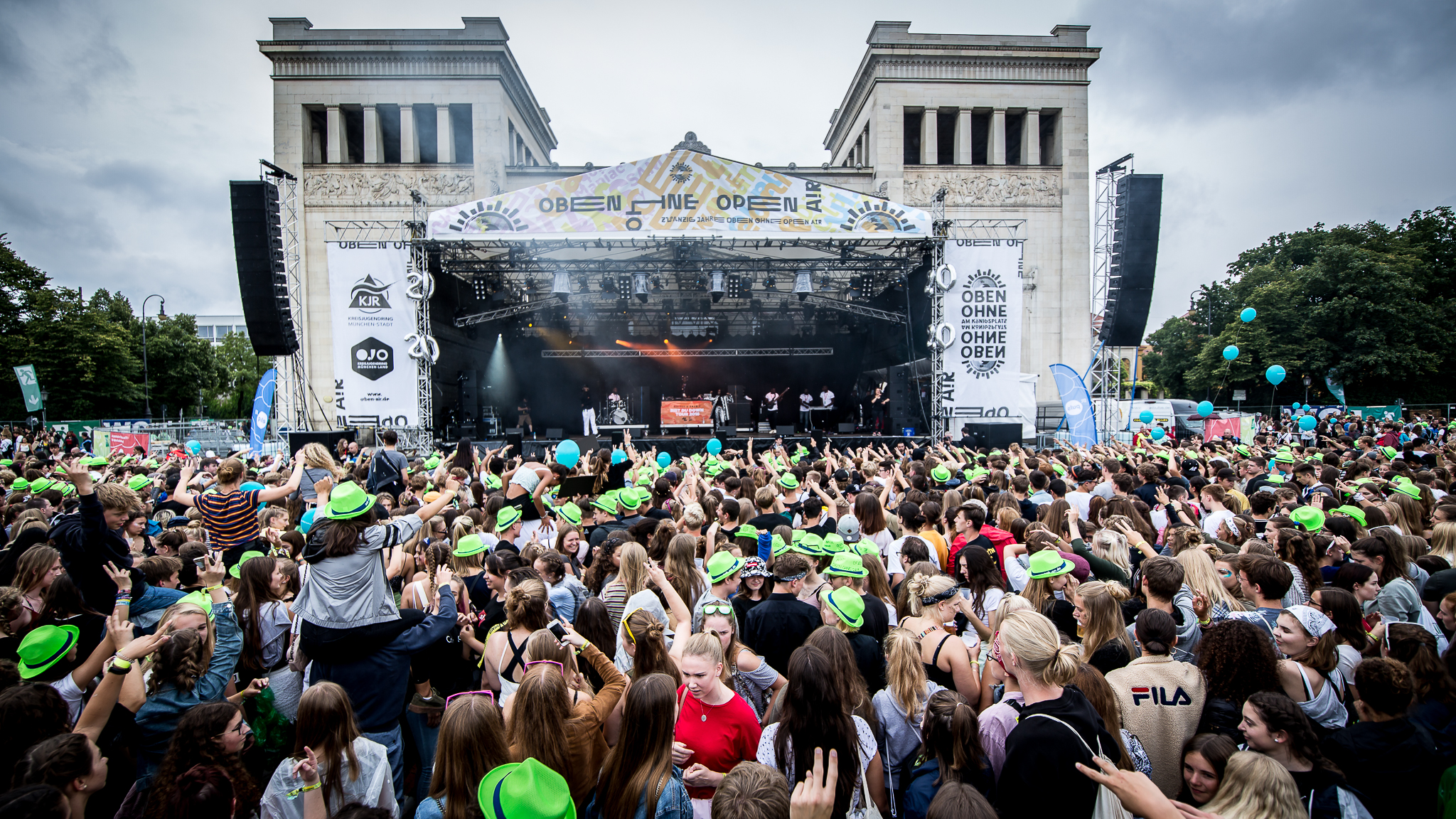 "OBEN OHNE" am Köngisplatz